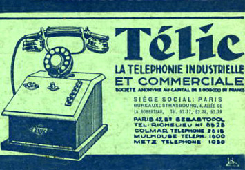 Publicité pour Télic dans La Vie en Alsace, août 1933